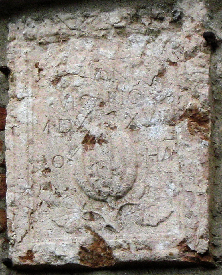 Medole, stemma della famiglia Melone sulla torre civica.